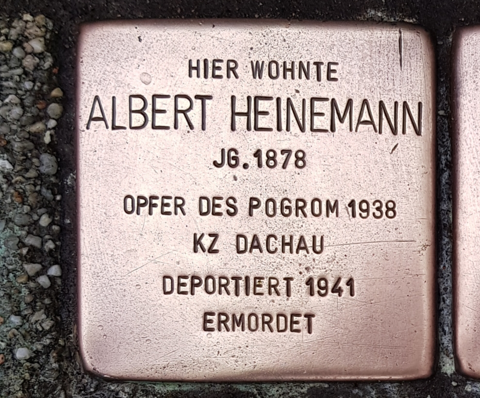 Ort: Bechemstr. 4, 47058 Duisburg-Duissern